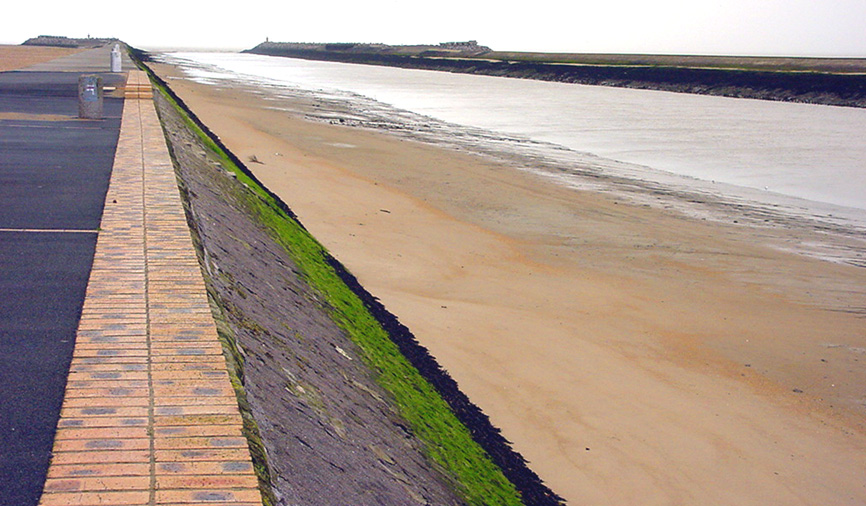 Estuaire endigué de l'Aa, près de la centrale nucléaire de Gravelines. Zone très chassée pour son gibier d'eau abondant et pour partie classée en réserve naturelle nationale (Réserve de Oye-Plage), d'importance européenne.